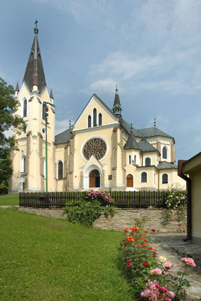 Slovakia, Levoča (Mariánska hora) Bazilika Panny Márie